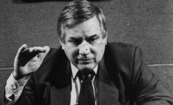 Héctor Horacio Dalmau. En 1983 fue electo Diputado Nacional por el justicialismo. En la década del ‘90 como funcionario público (Subsecretario de Ambiente Humano de la Nación) denunció a María Julia Alsogaray por la denominada “limpieza del Riachuelo” y los créditos solicitados.